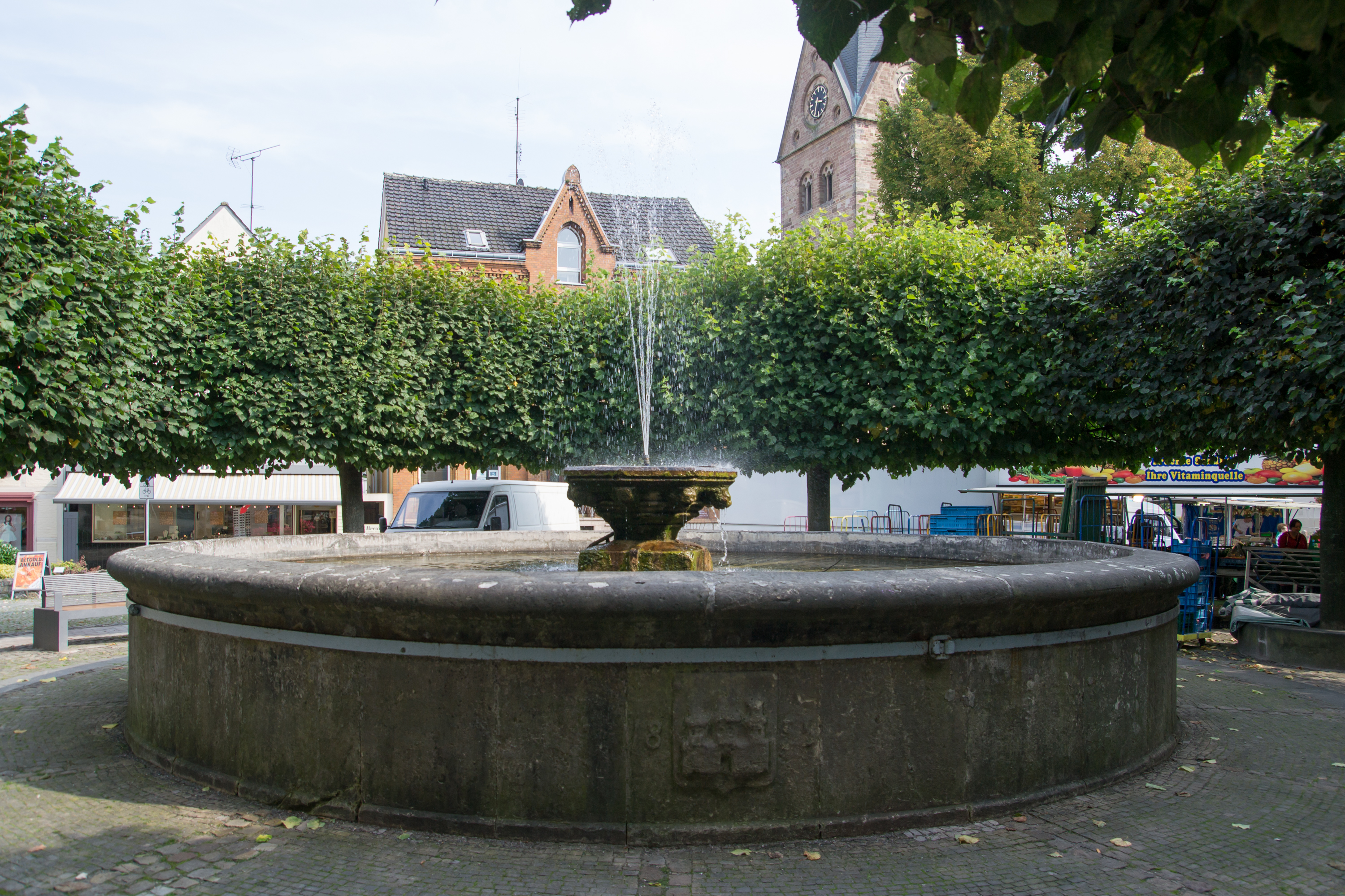 This image shows a heritage building in Germany, located in the North Rhine-Westphalian city Steinheim (Westfalen) (no. 75). Brunnen "Kump"